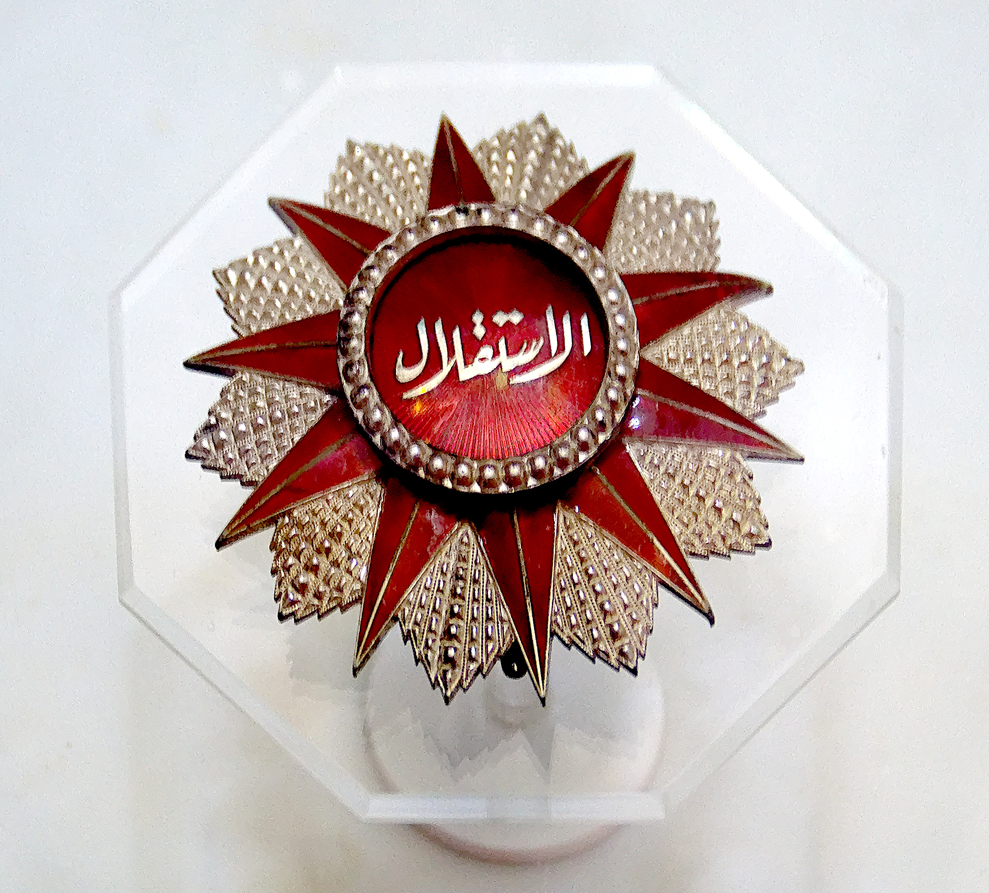 Ordre de l'Indépendance, décerné à Habib Bourguiba